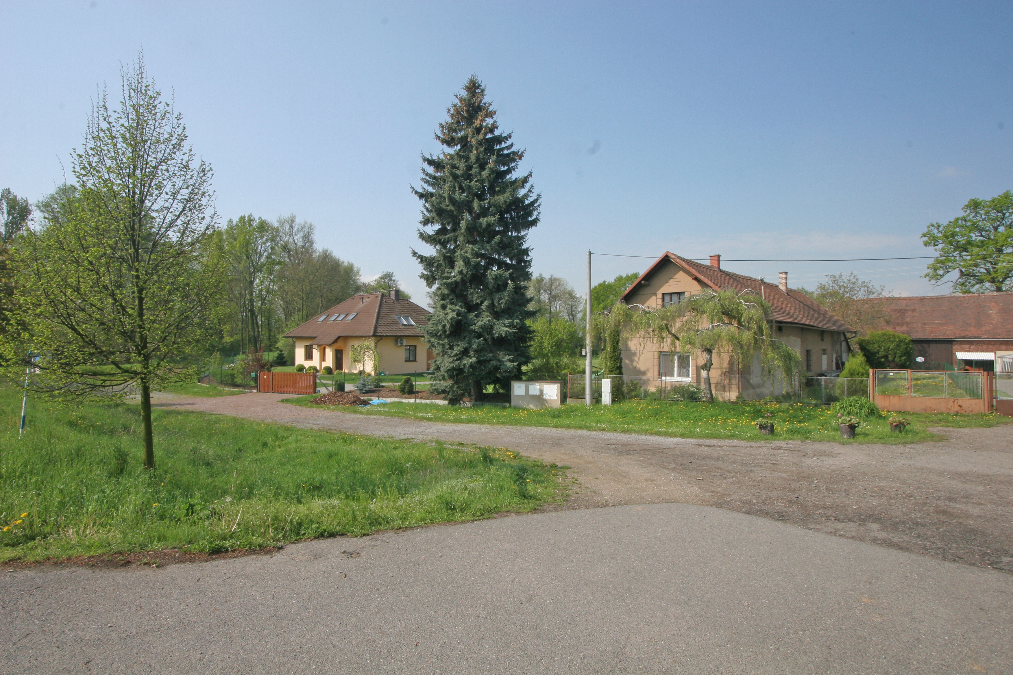 Žižín čp. 22 a 6